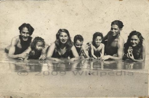 Album familiar familia Barros Molano